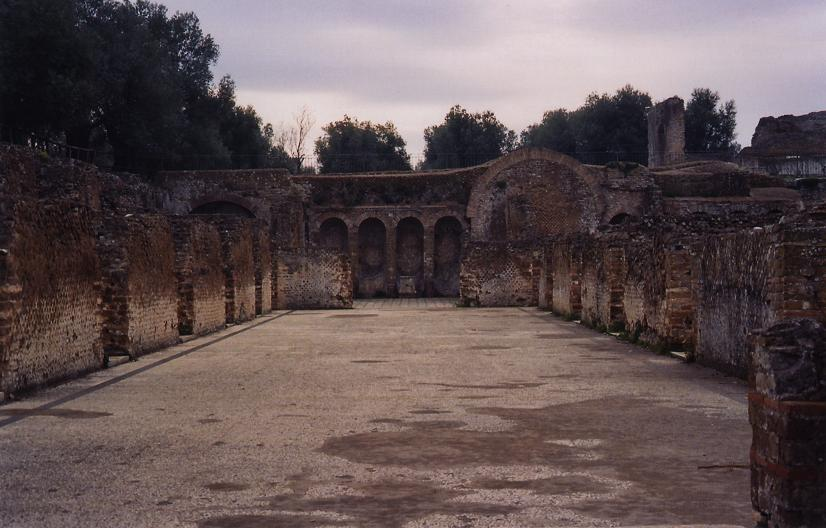 L'hospitalia, villa Adriana Auteur: Guilhem Dulous